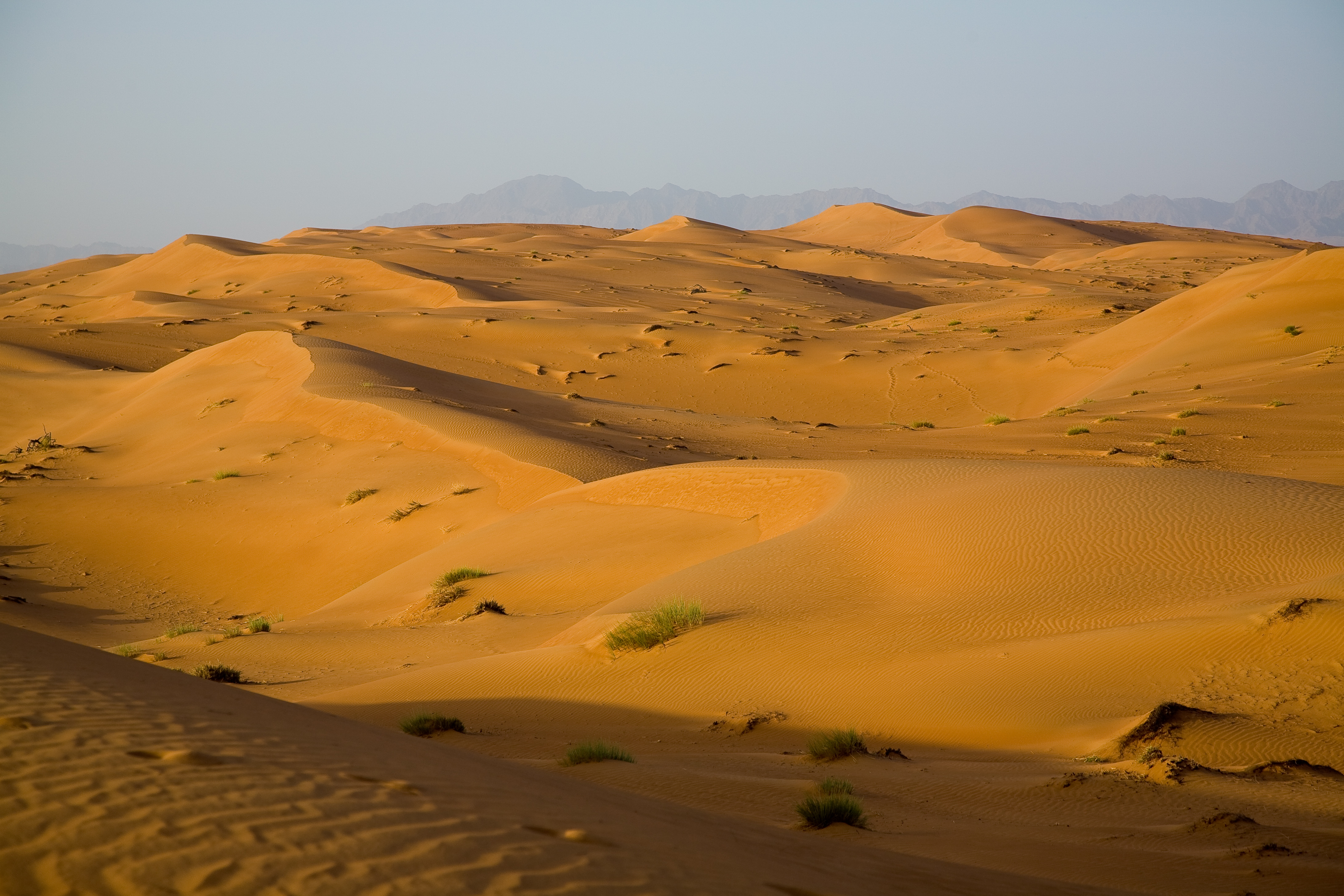 Wahiba Sands, Oman